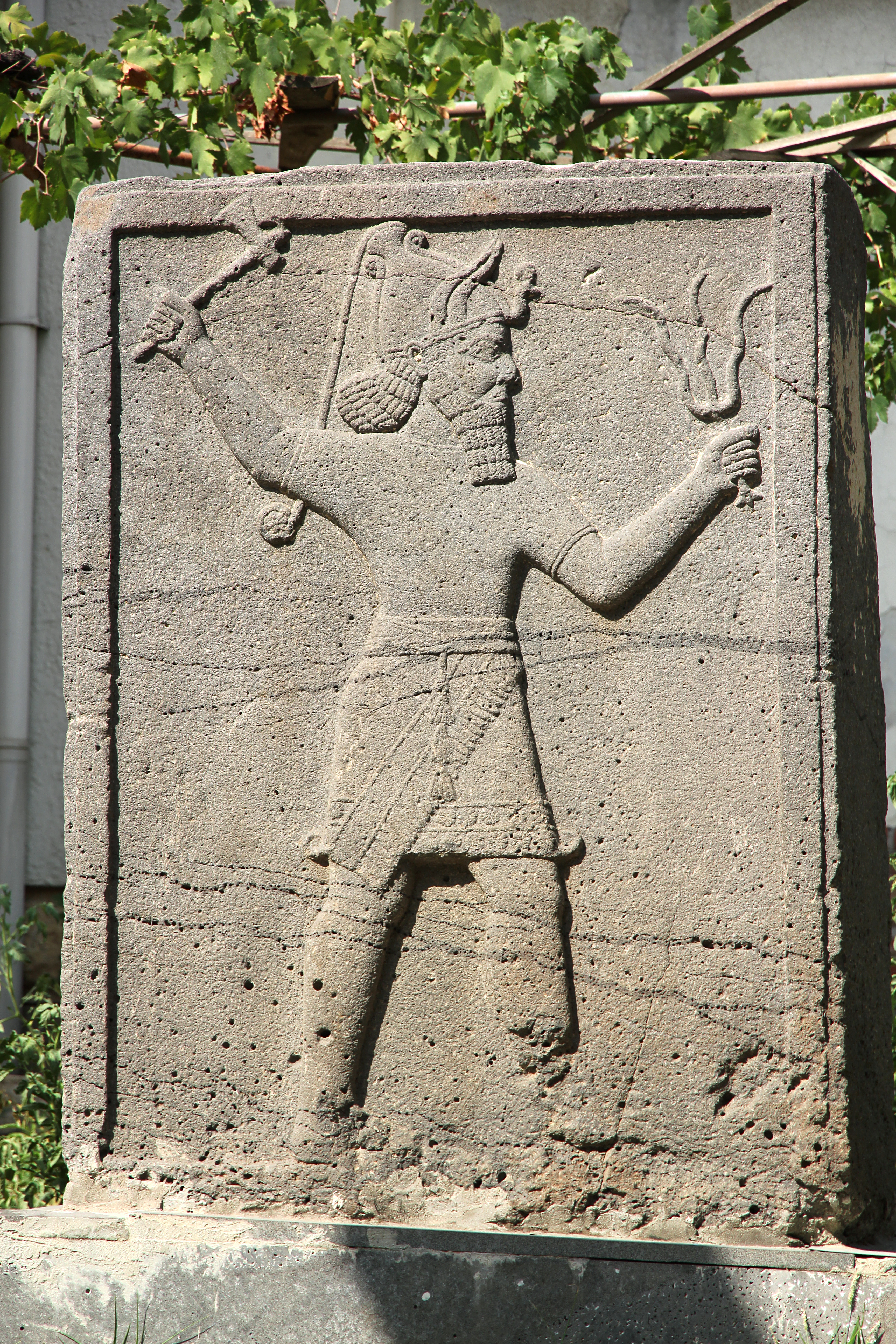 Archäologisches Museum Gaziantep, Türkei, späthethitische Stele des Wettergottes aus Gözlühöyük